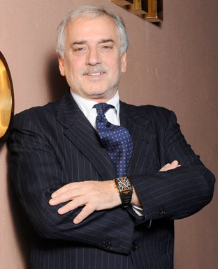 Raffaele Pagnozzi, Dirigente sportivo